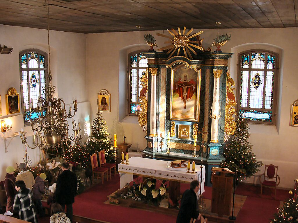 Kościół Św. Trójcy - Szczecin Krzekowo